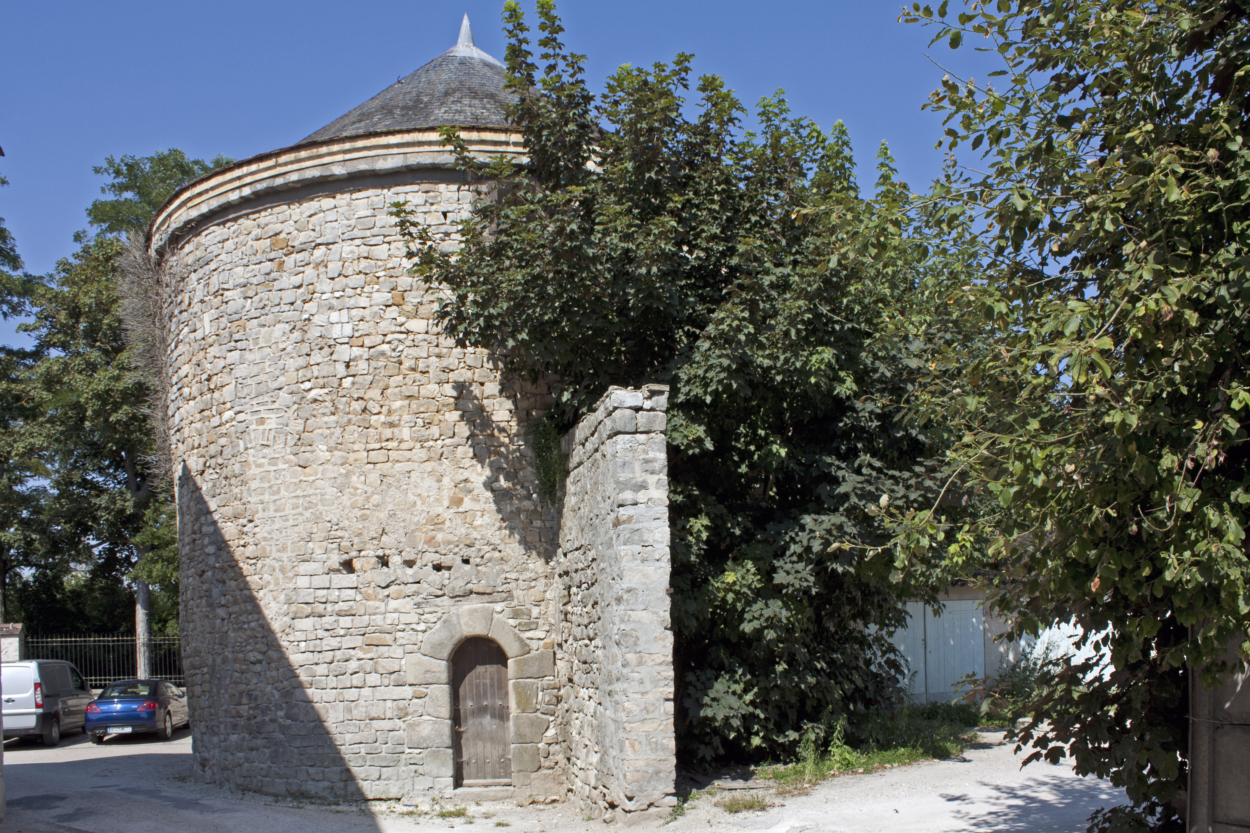 Colombier du domaine du Moustier